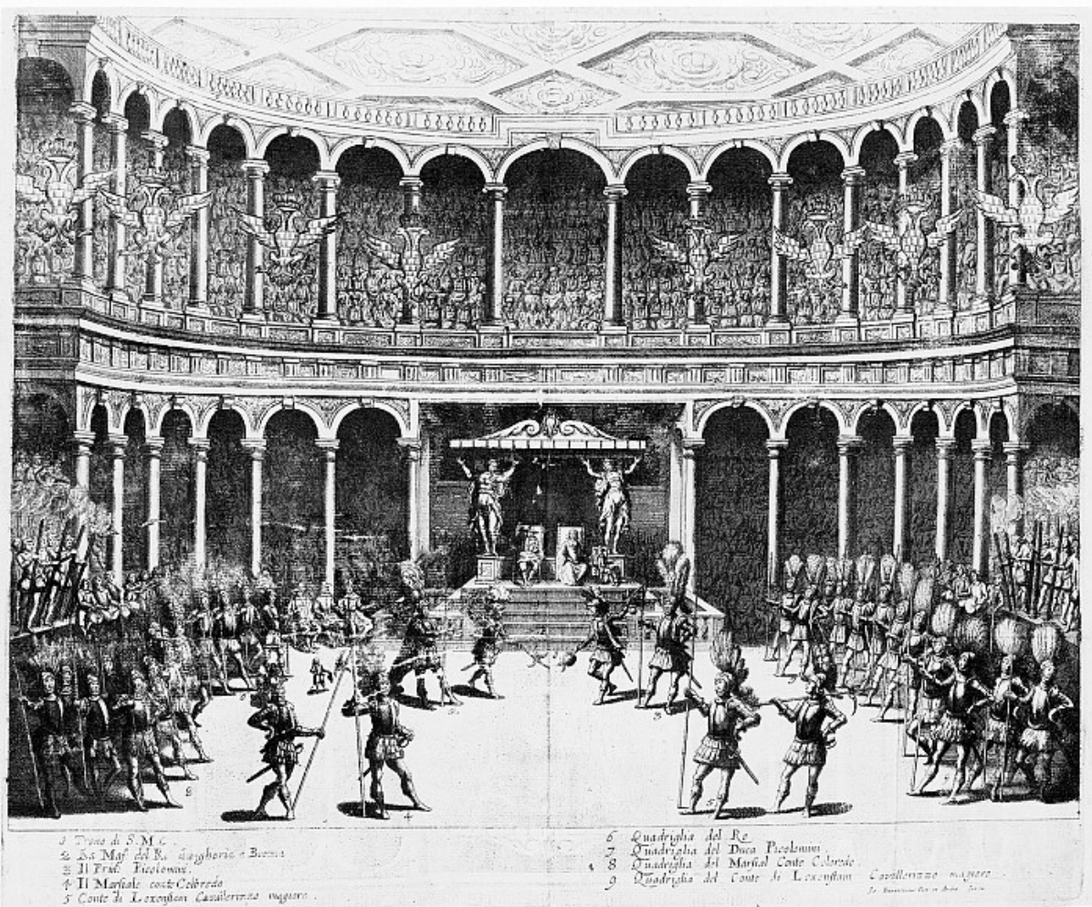 Darstellung eines Fuß-Turniers am Hofe Kaiser Ferdinands III., 1652, Einzelblatt aus "La Gara", Repronegativ nach Stich Das Innere des ersten Wiener Opernhauses während einer Vorstellung von Antonio Bertalis Oper „La Gara“ (Der Wettstreit)